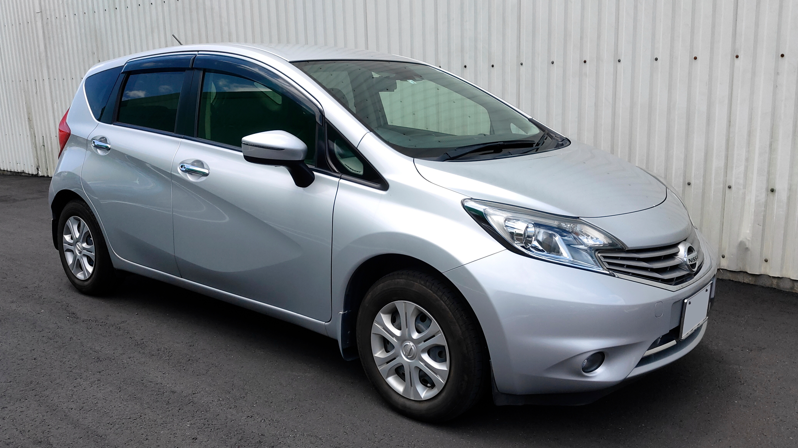 NOTE E12 MEDALIST 前期型（2016年）